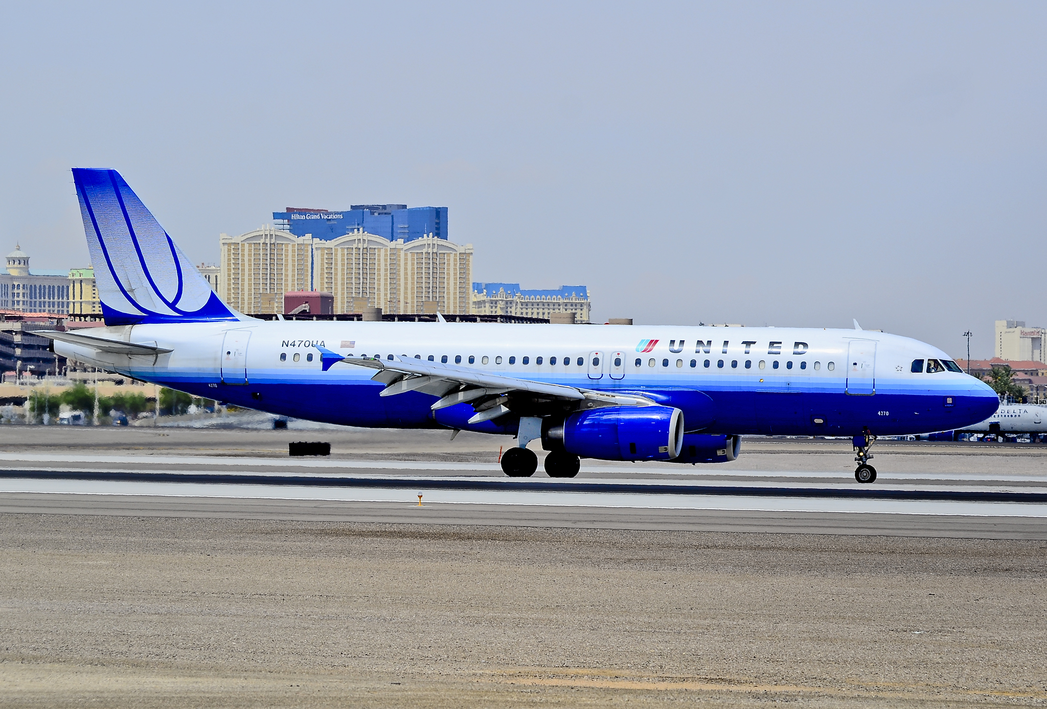 Las Vegas - McCarran International (LAS / KLAS) USA - Nevada, August 16, 2012 Photo: Tomás Del Coro